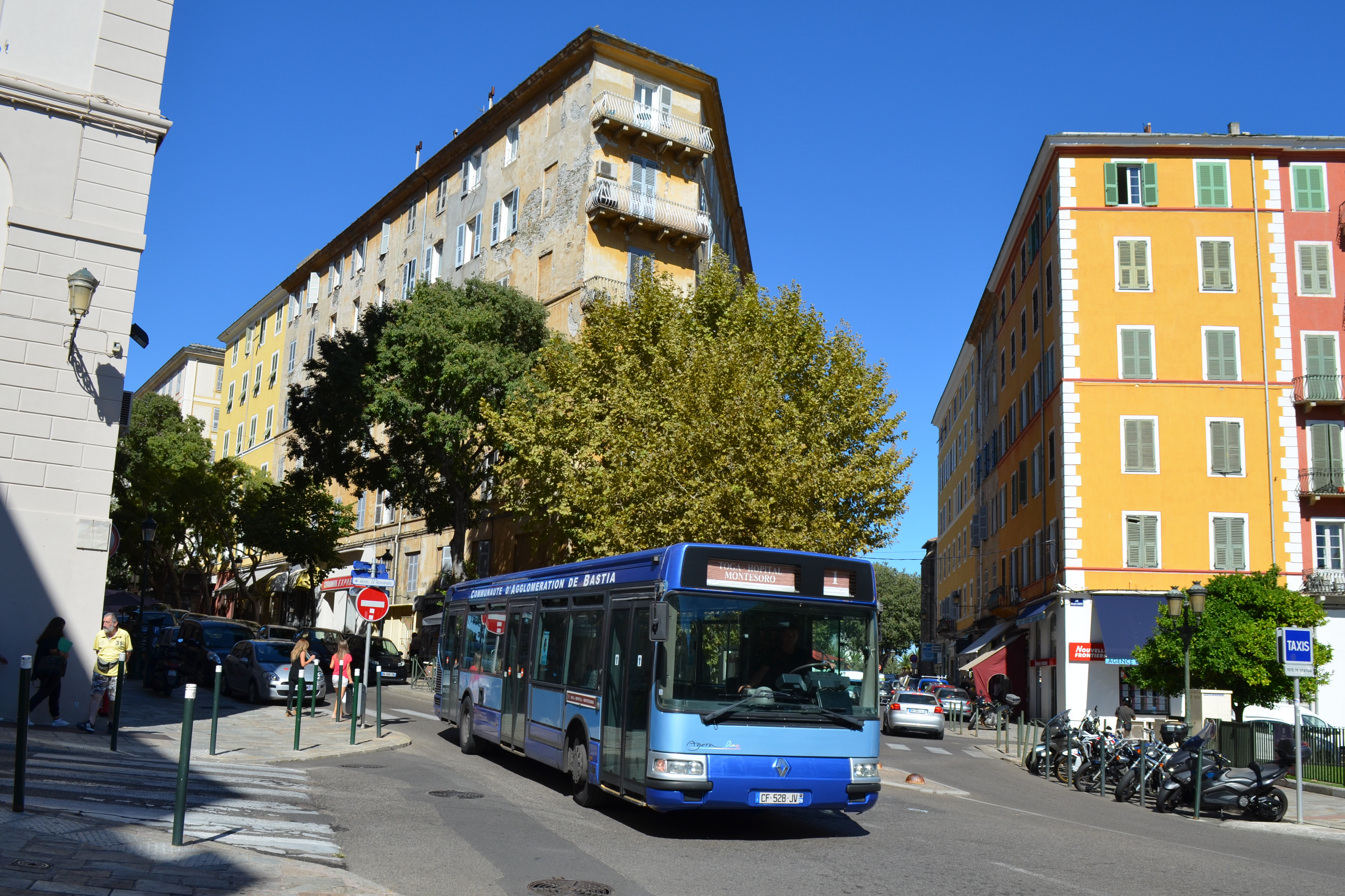 Bus de la ligne 1 du réseau de bus de Bastia en Corse.